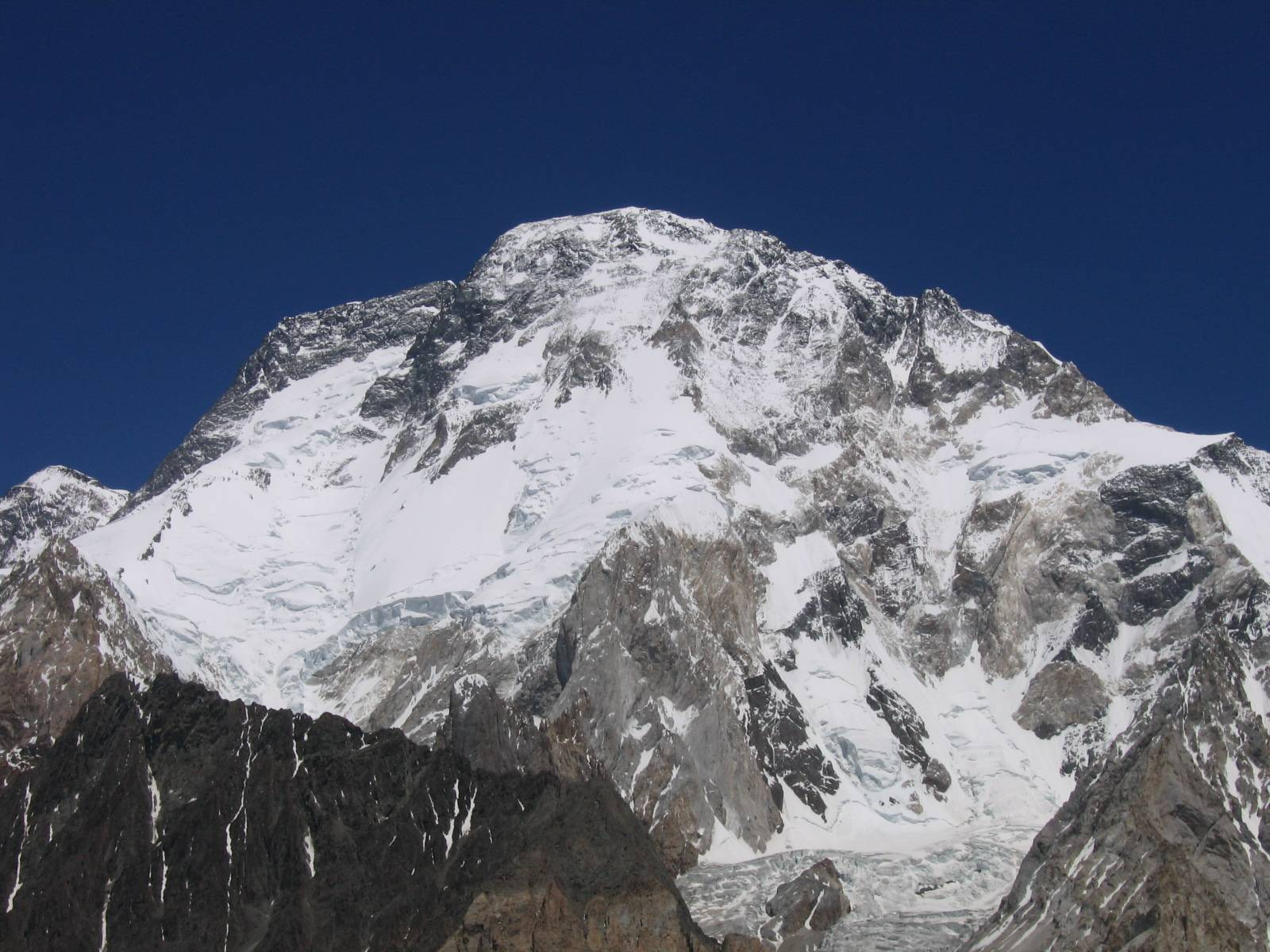 Broad Peak 2006